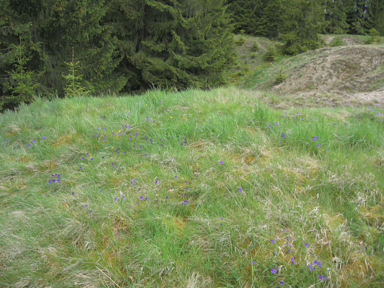 Haldenbereich mit Violetten Galmei-Stiefmütterchen (Viola guestphalica) im Naturschutzgebiet Bleikuhlen, Marsberg